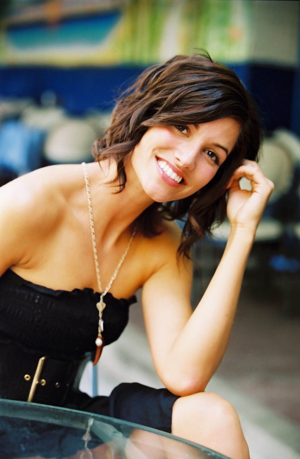 Kristin Holt